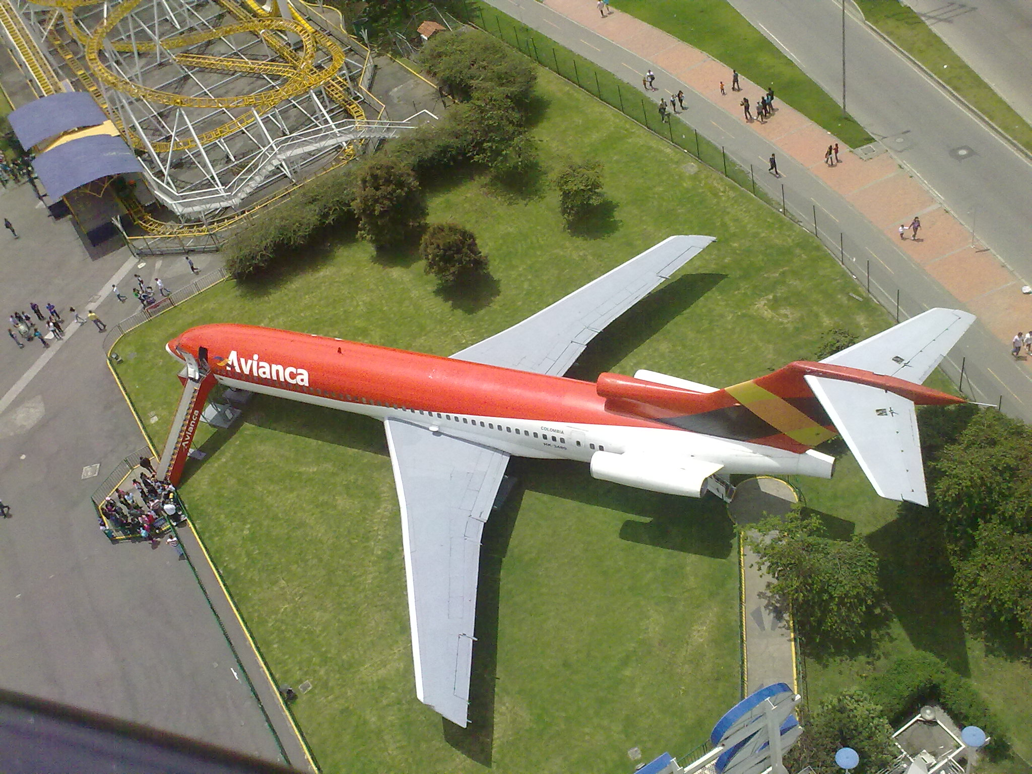 B727 de Avianca